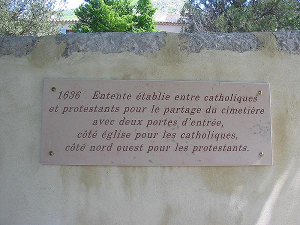 Plaque apposée sur le mur du cimetière de Brette 1636